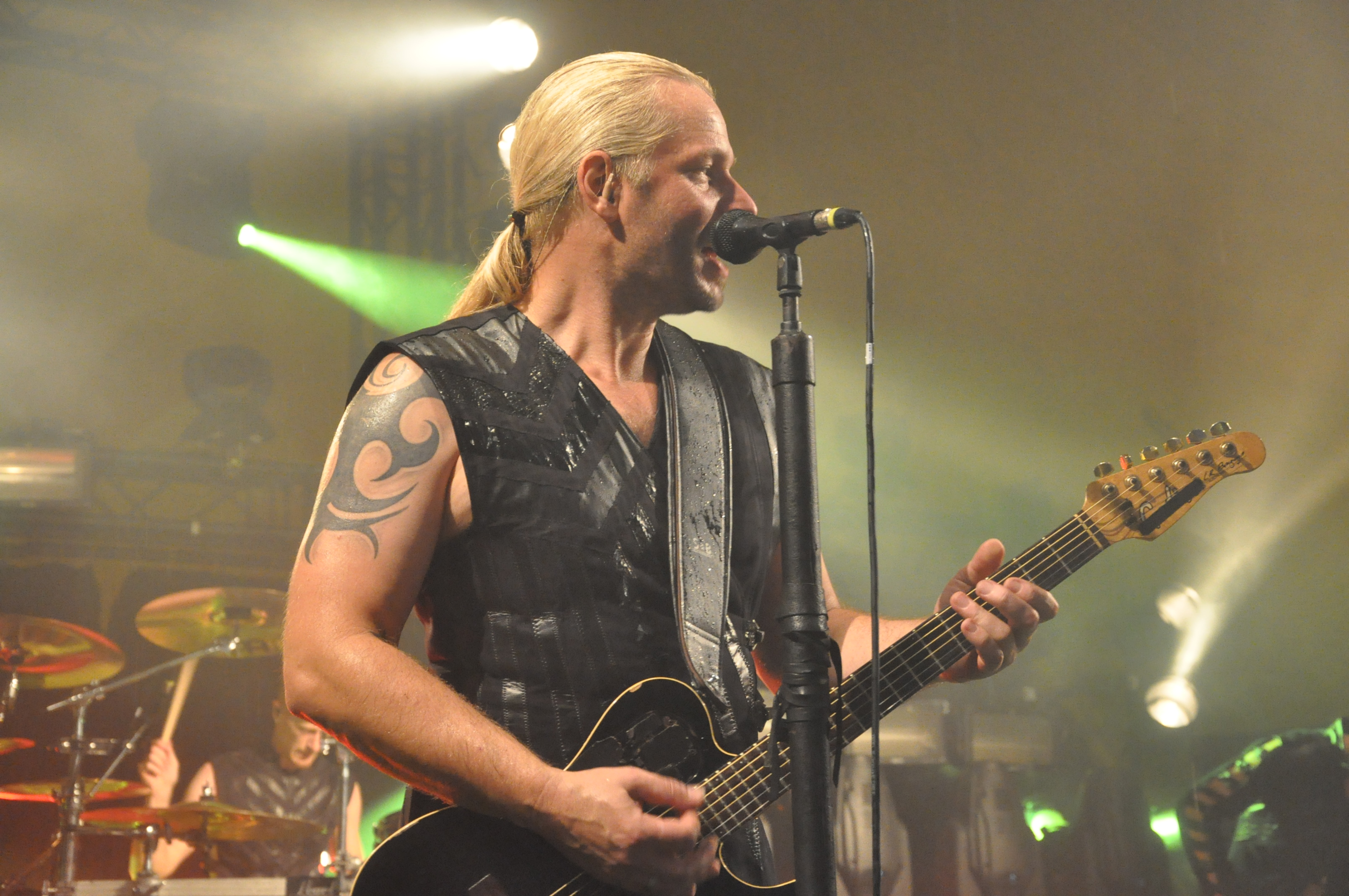 Feuertal 2013 in Wuppertal auf der Waldbühne Hardt: Gruppe Subway to Sally